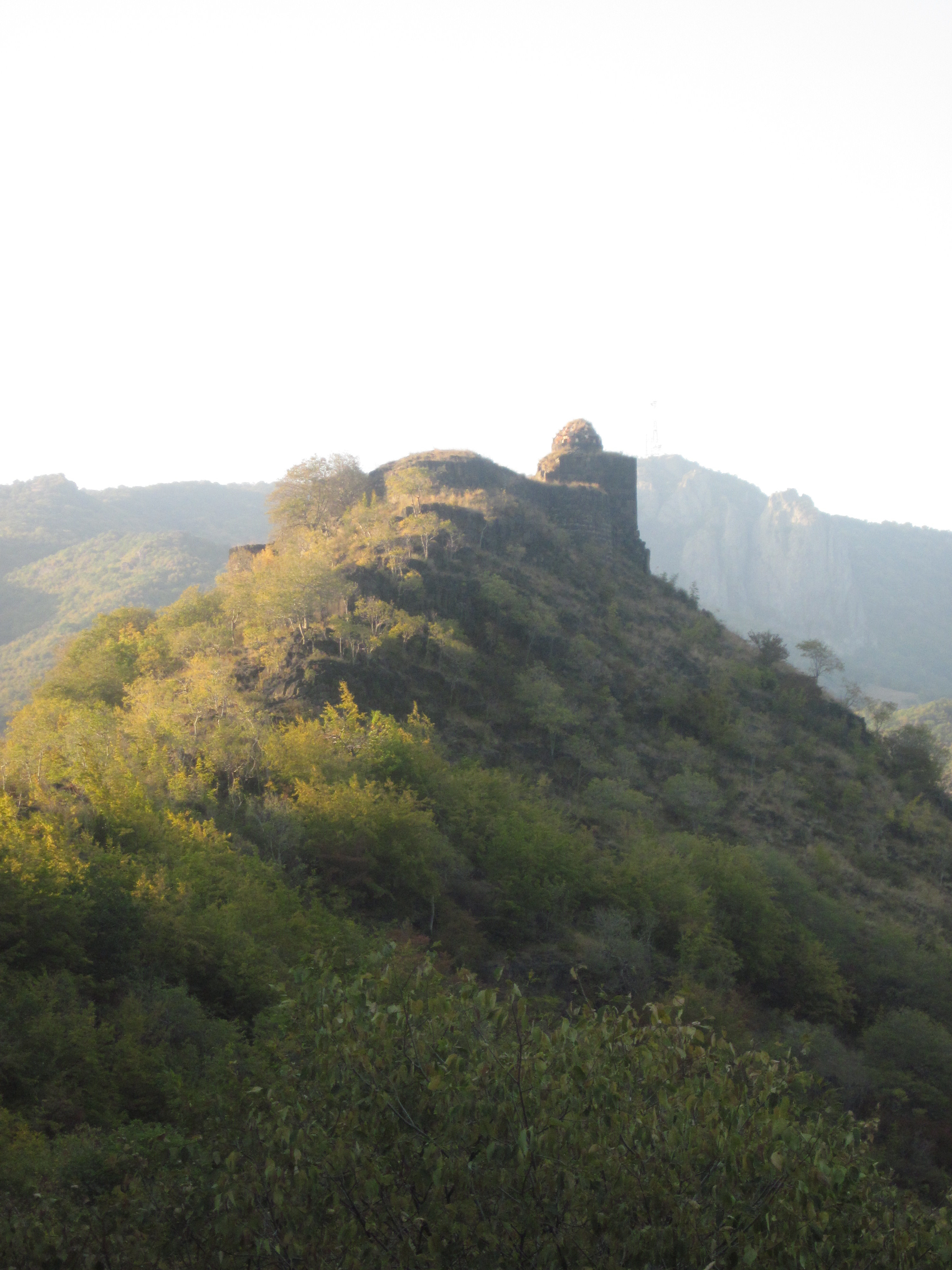 Կայան բերդ 60/2